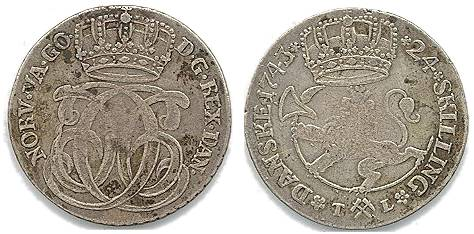 Norwegischer Rigsorten von 1743.